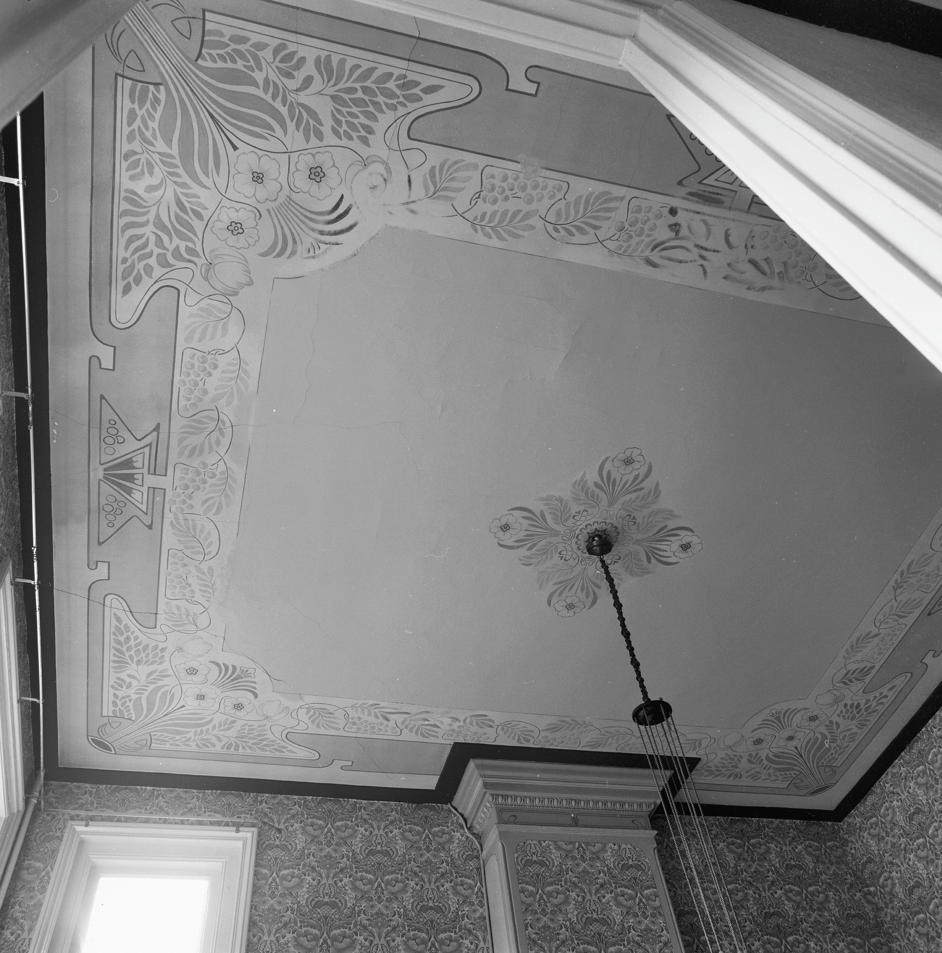 Julia Jan Wouters Stichting: plafond schildering